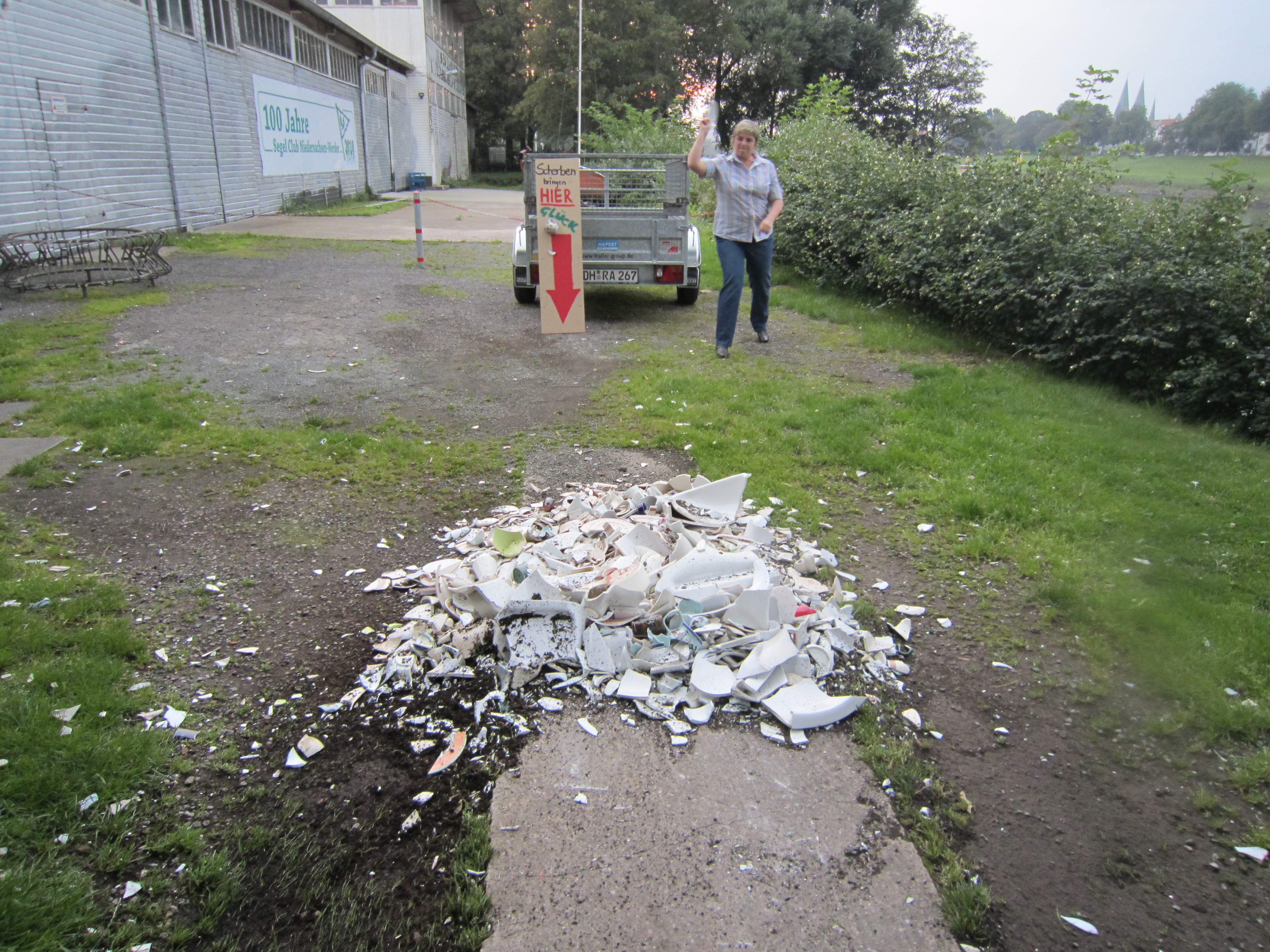 kapotte scherven op Polterabend